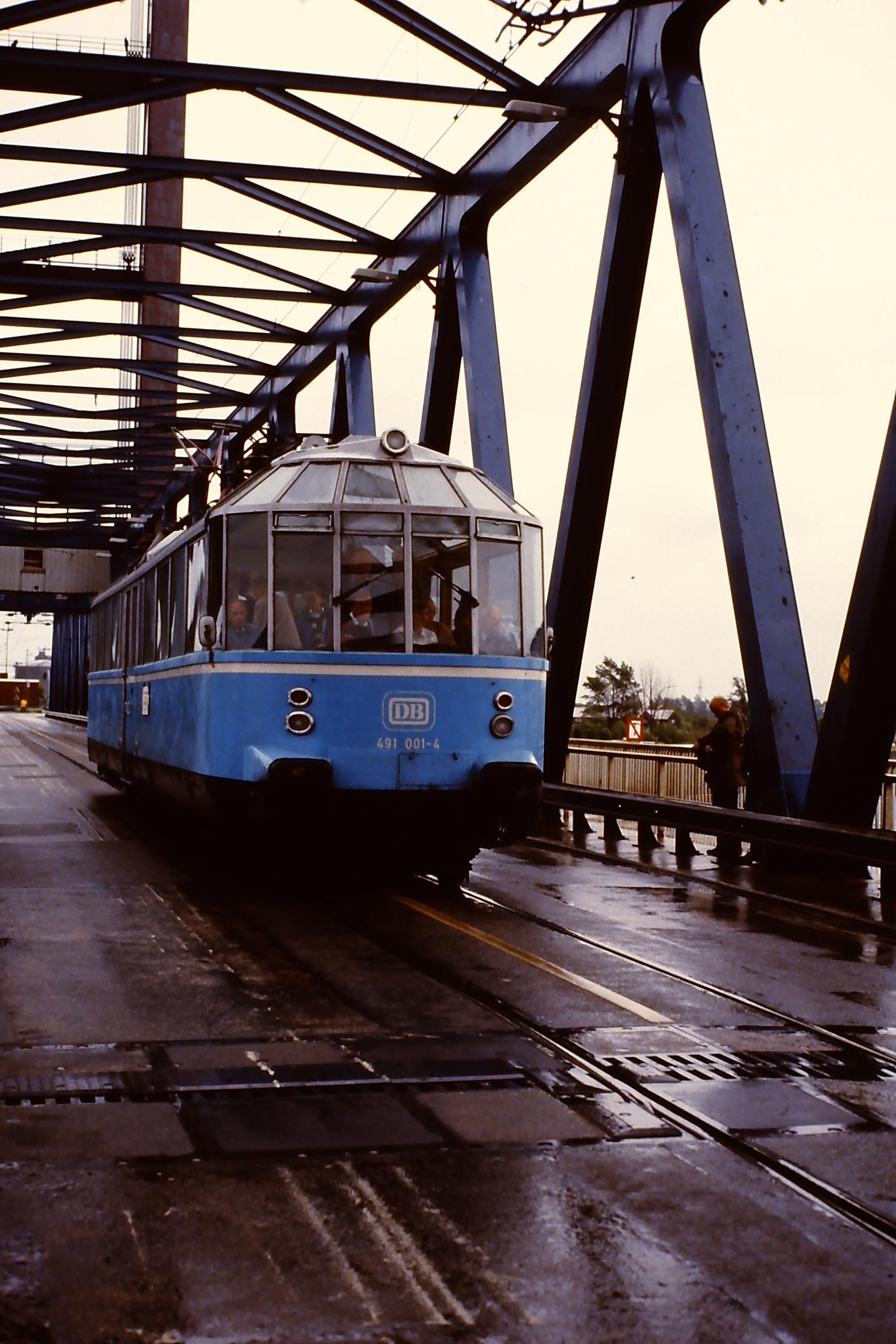 Der Gläserne Zug (491 001) auf der Kattwykbrücke im Hafen Hamburg